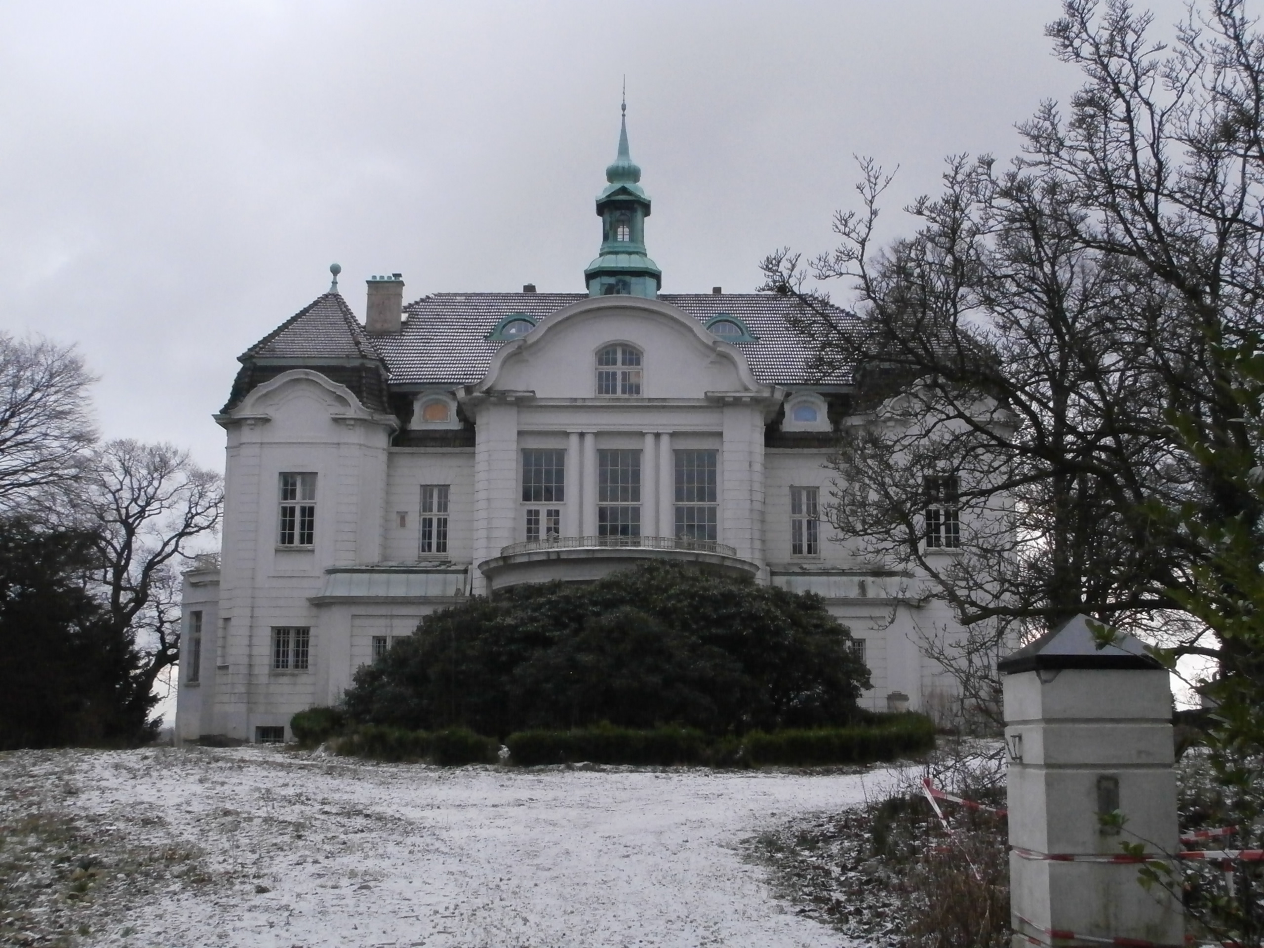 1904 von dem Kaufmann Carlos de Freitas nach Plänen der Architekten Lundt & Kallmorgen errichtetes freistehendes Einfamilienhaus mit axialer Zufahrt und UmfahrungsrondellThis is a photograph of an architectural monument.